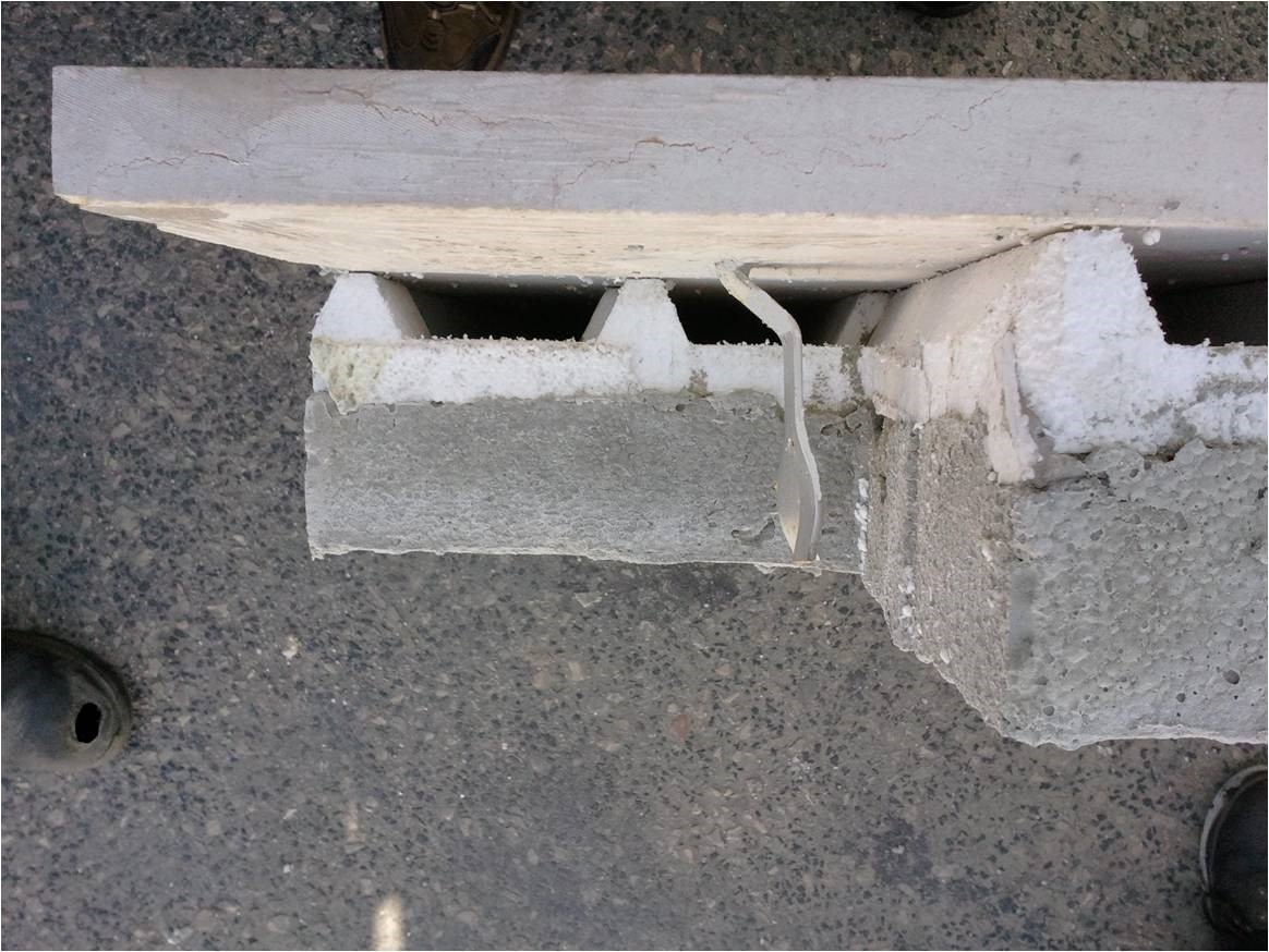 אוורור ובידוד חיצוניים, רצופים, לאורך כל הבניין